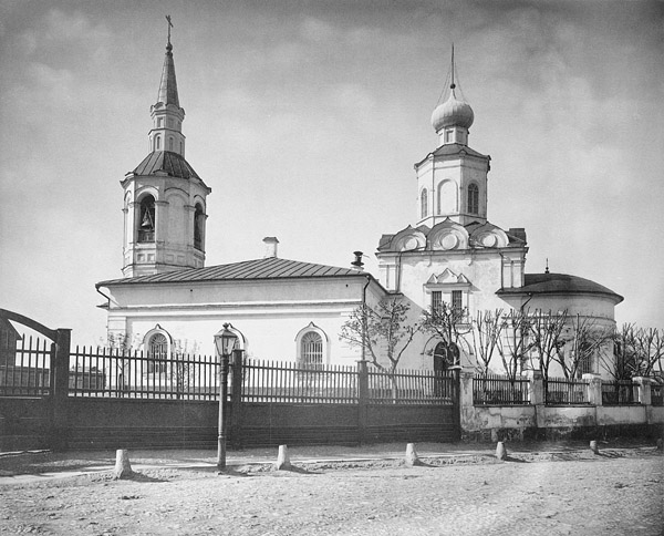 Храм Воздвижения Креста Господня на Чистом Вражке (на Пометном вражке, близ Девичьего поля)